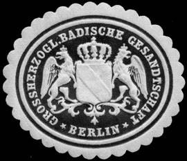 Sealing stamp Title: Grossherzogl. Badische Gesandtschaft Description: schwarz, weiß, geprägt Place: Berlin size: 3x3 cm